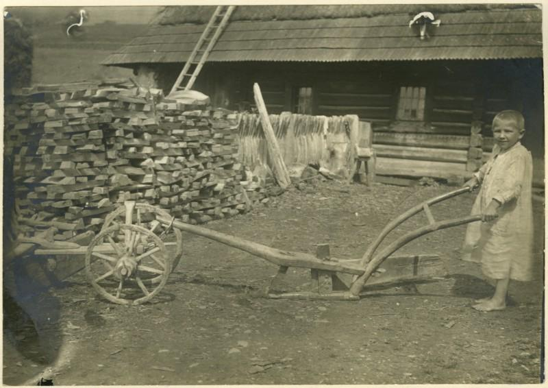 Село Матків Турківського району. Дитина з плугом.